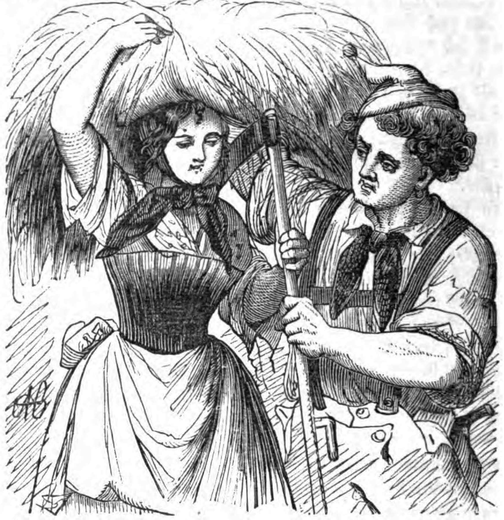 Berthold Auerbach, Schwarzwälder Dorfgeschichten, Sträflinge. – „Du hast ein schwere ‚Traget’,“ sagte Jakob.